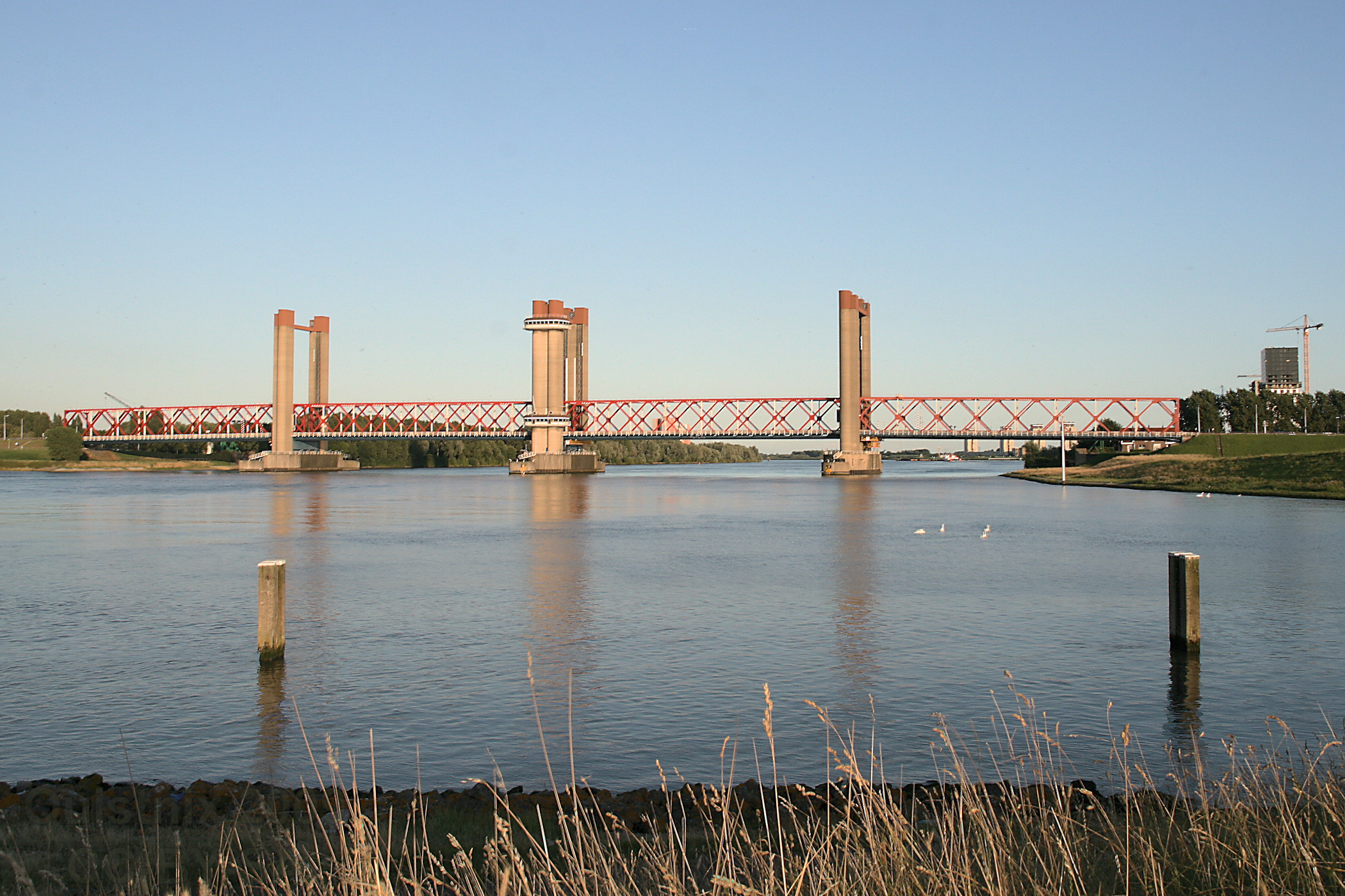 Hdr (Aeb 0 +1/-1)